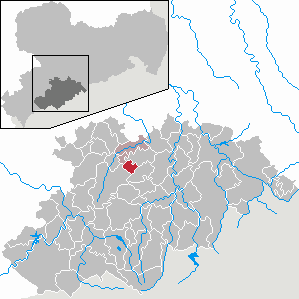 Auerbach im Erzgebirgskreis, Sachsen